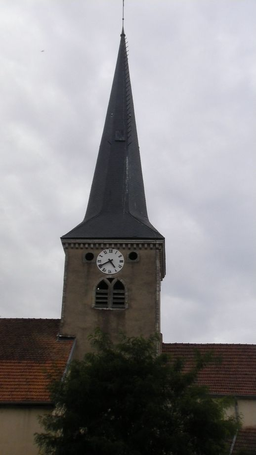 Eglise de champagne sur Vingeanne 21